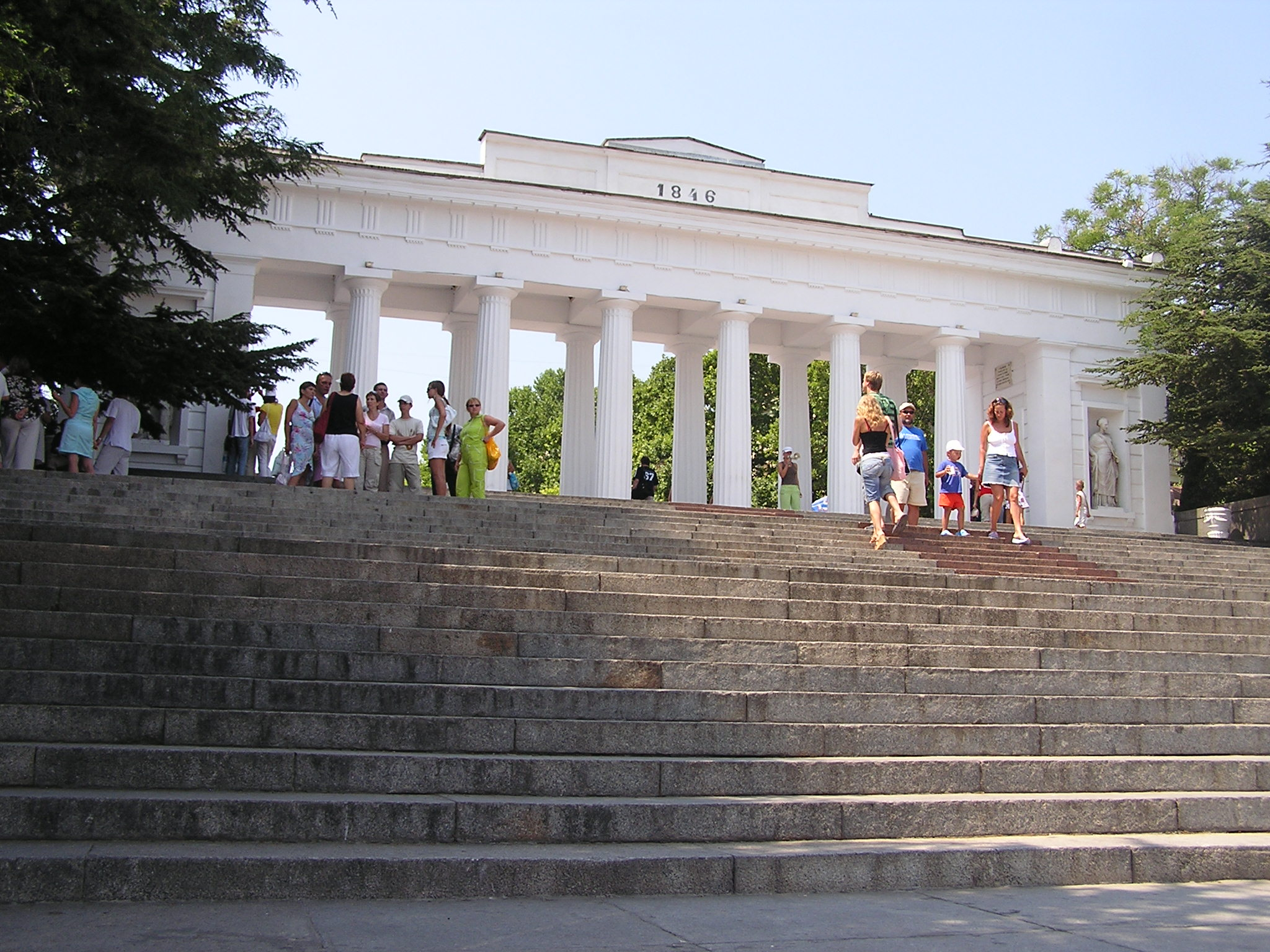 Севастополь. Графская пристань